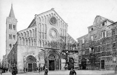 Scansione di cartolina del 1910 della mia personale collezione